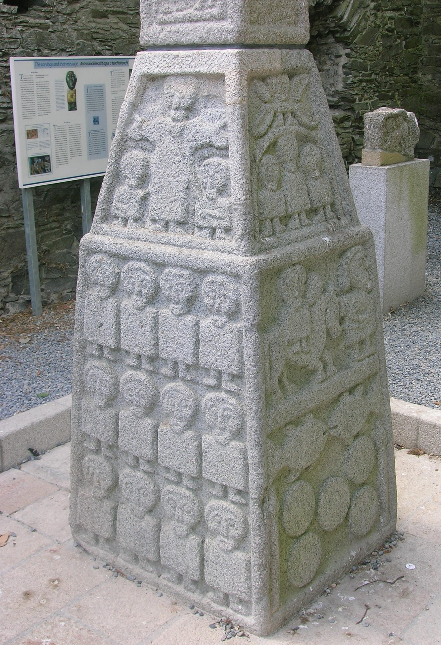 Pedestal de la Cruz de piedra de Moone / Maen Colmcille, Condado de Kildare, Irlanda. El relieve de la izquierda arriba representa la crucifixión. Debajo, los doce apóstoles. El de la derecha arriba representa personas y ángeles. En medio, la huida a Egipto. Más abajo, la multiplicación de los panes y los peces.